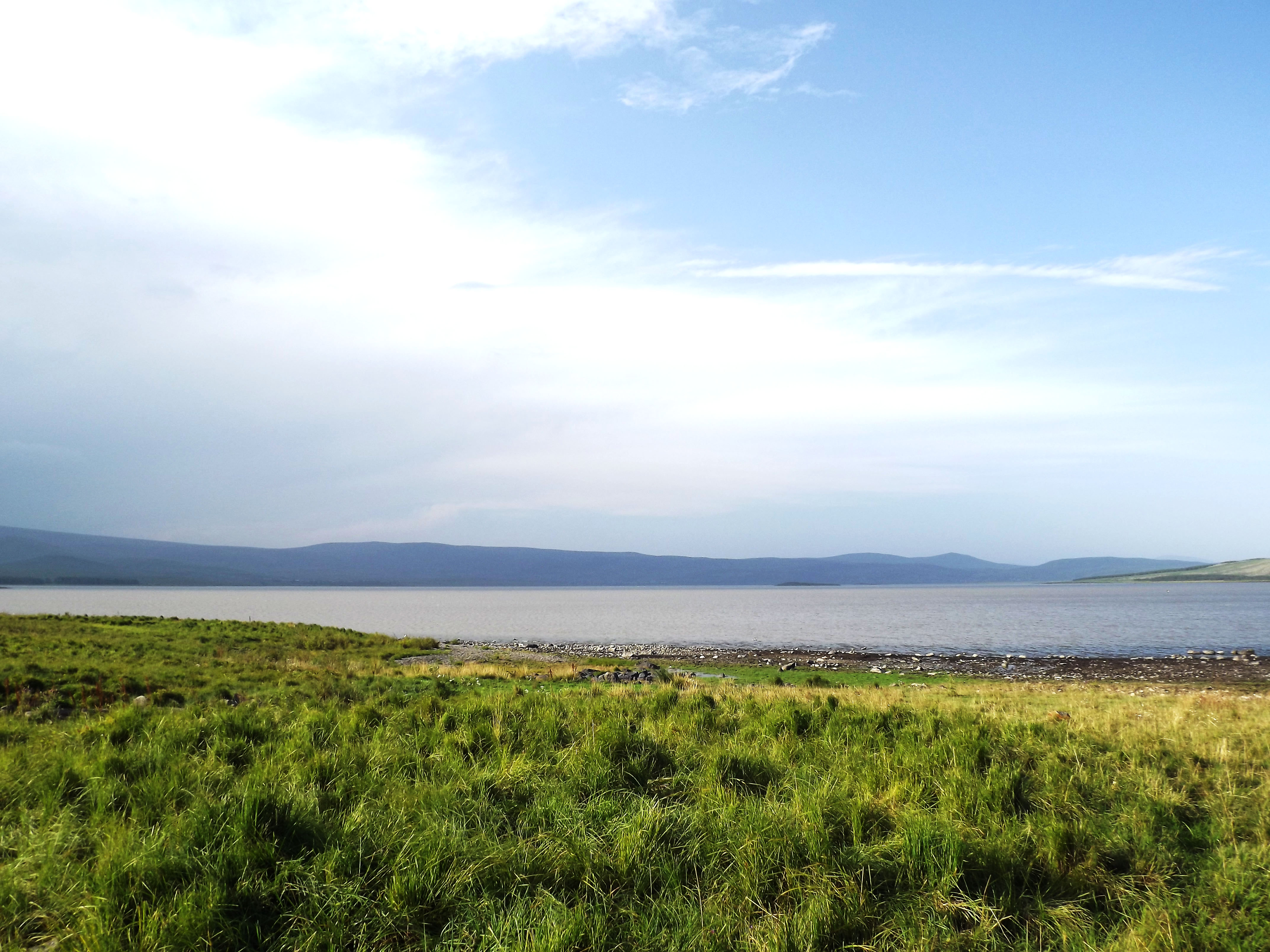 Արփի լիճ